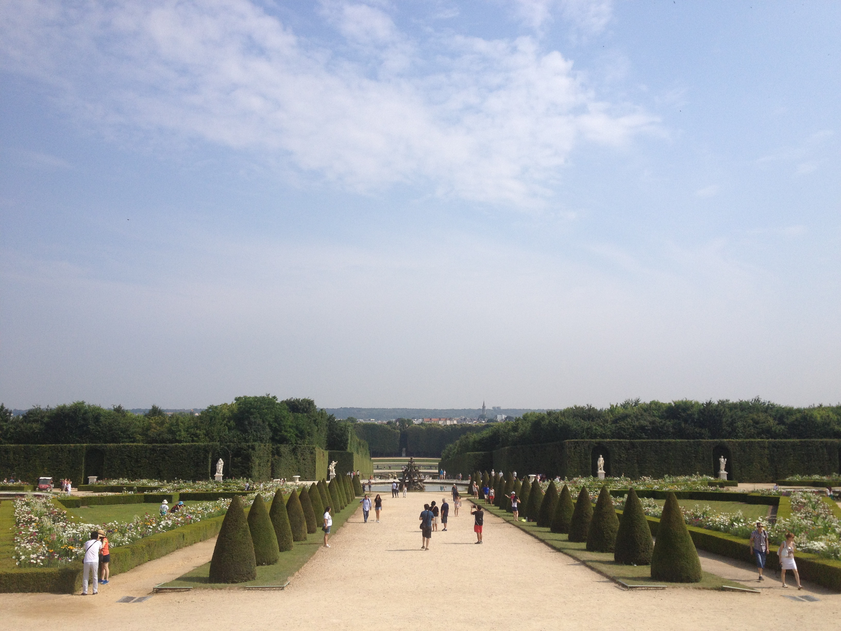 Versailles, France